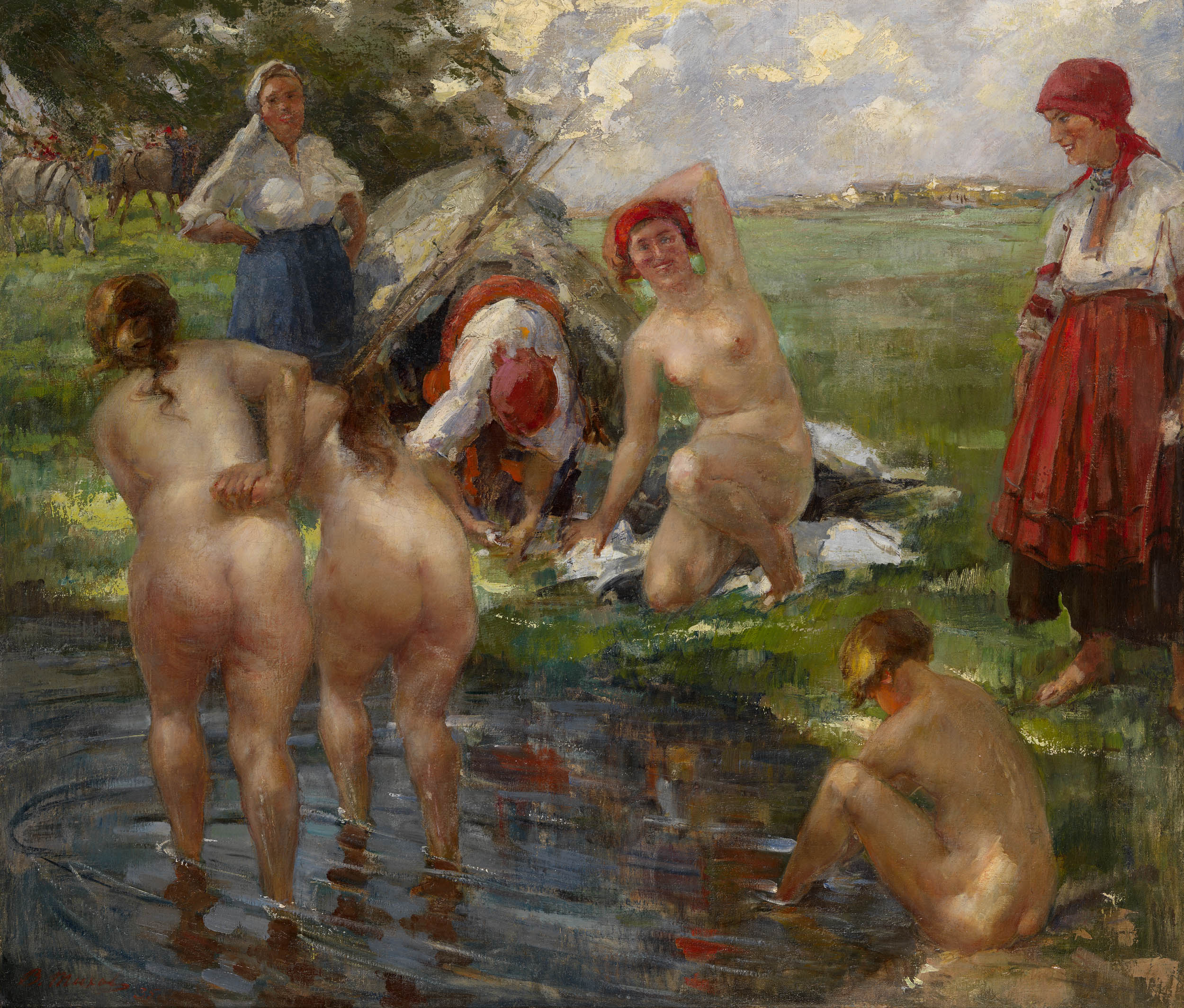 Тихов Виталий Гаврилович (Россия, 1876 - 1939) «Купание»